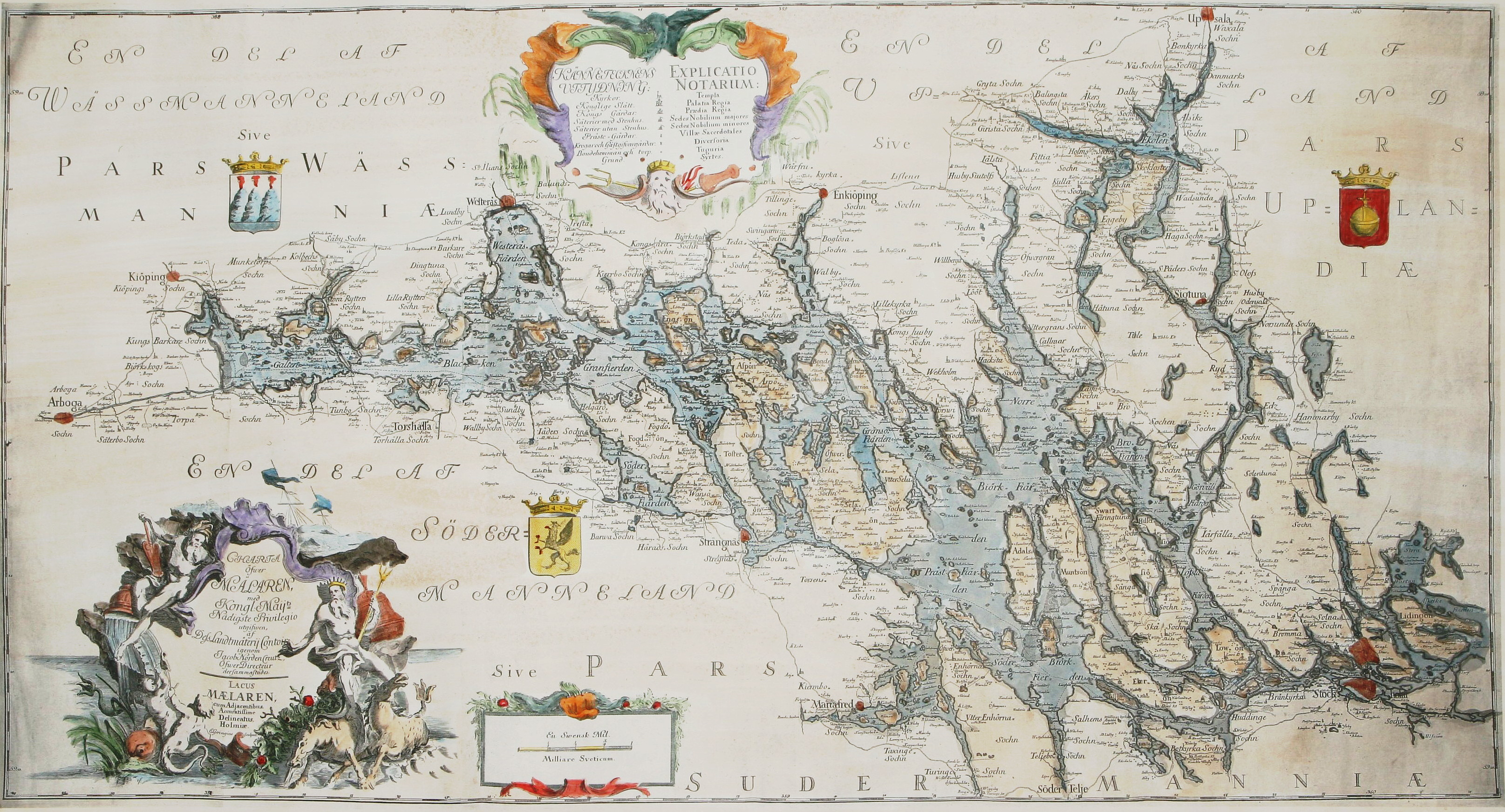 "Charta öfwer Mälaren med Kongl. Maÿts Nådigste Privilegio utgifwen af Dess Lantmäterij Contoir igenom Jacob Nordencreutz, öfwerdirecteur sammanstädes. Lacus Maelaren, cum Adjacentibus, Accuratissime Delioneatus, Holmiae. E. Geringus sculpsit".